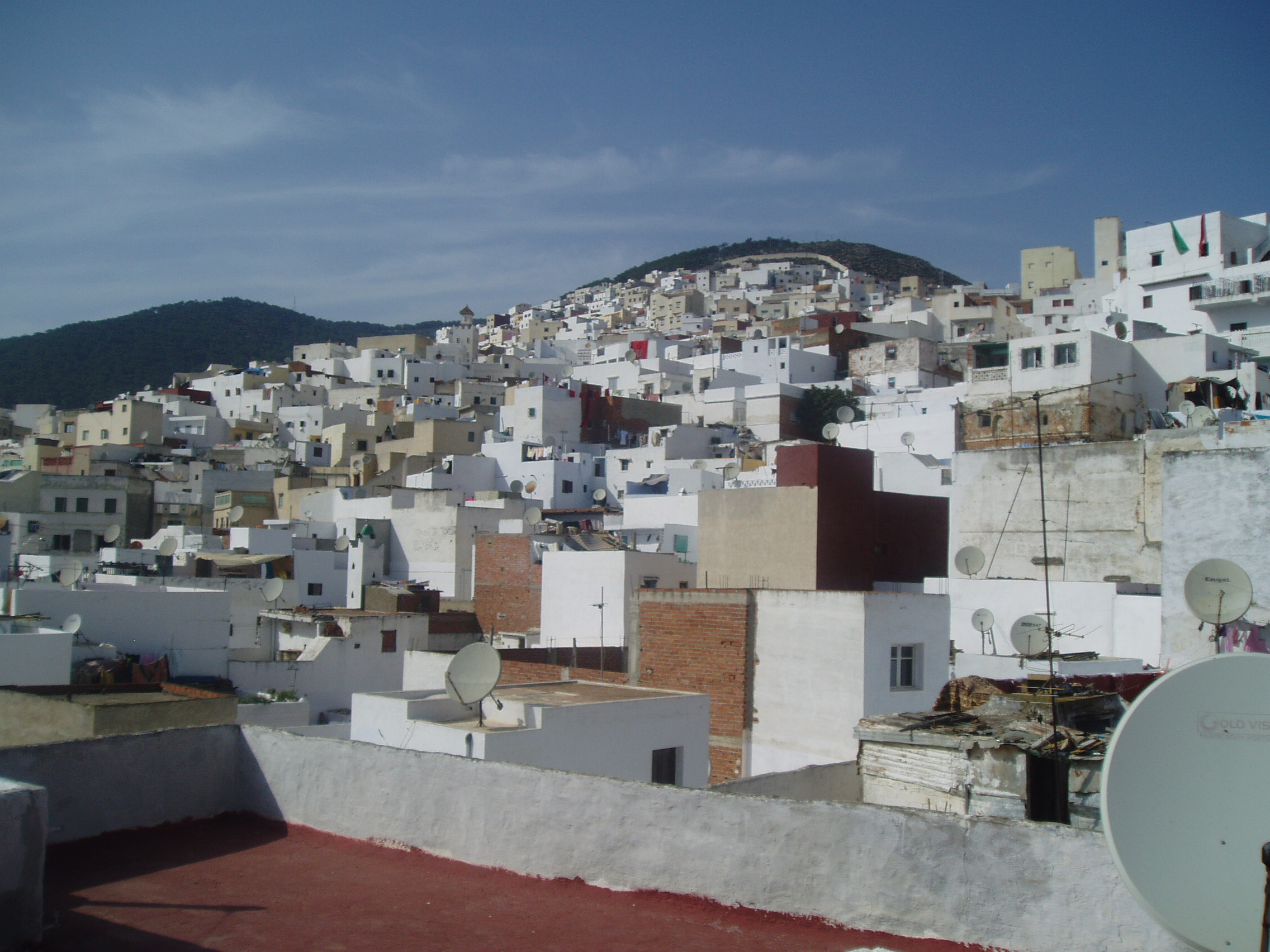 La parte de "Jbel Dersa" vista desde un tejado.